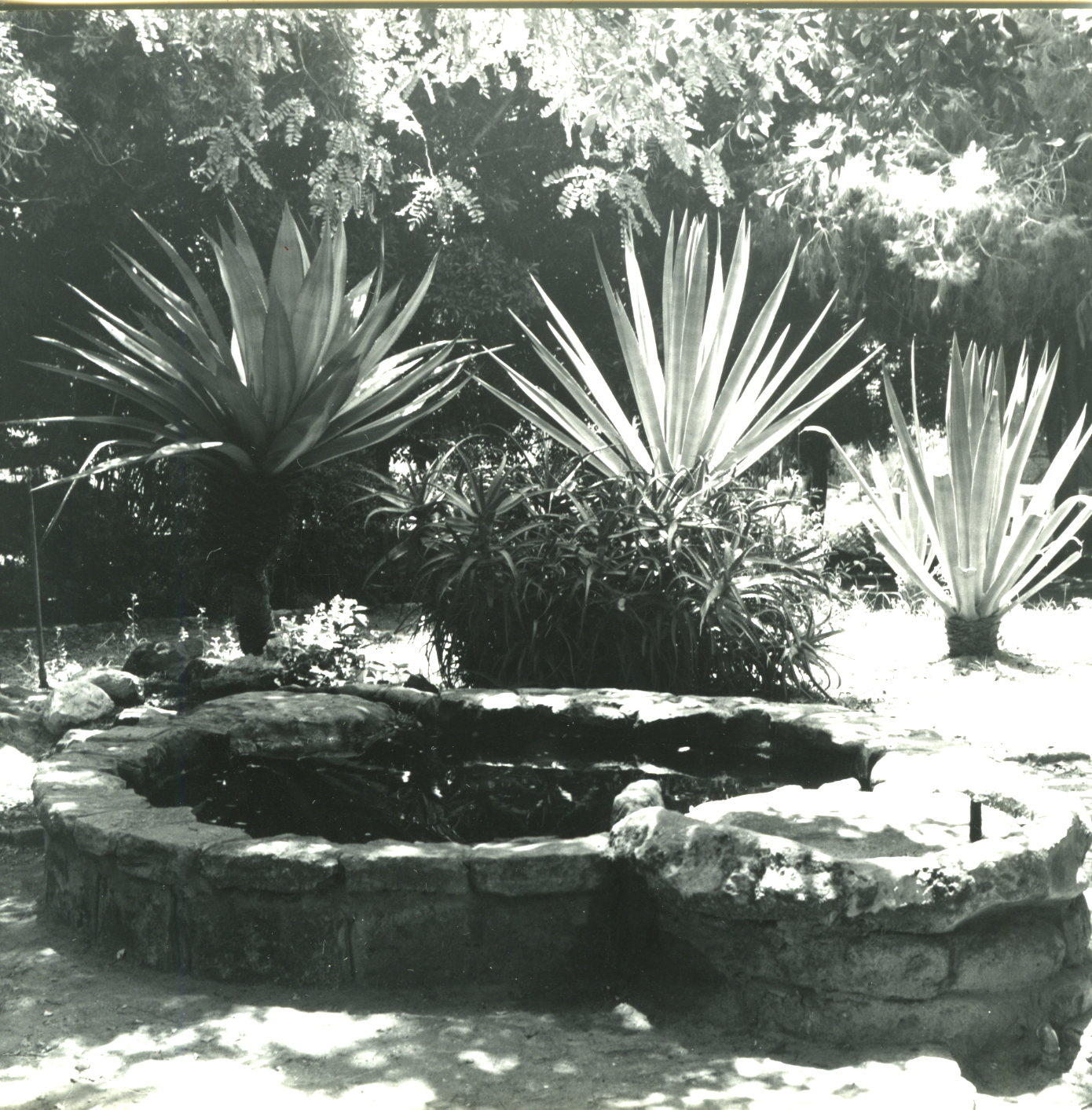 באר המים העתיקה בגן וריסלנד באדיבות "בית הראשונים"-מוזיאון לתולדות הרצליה